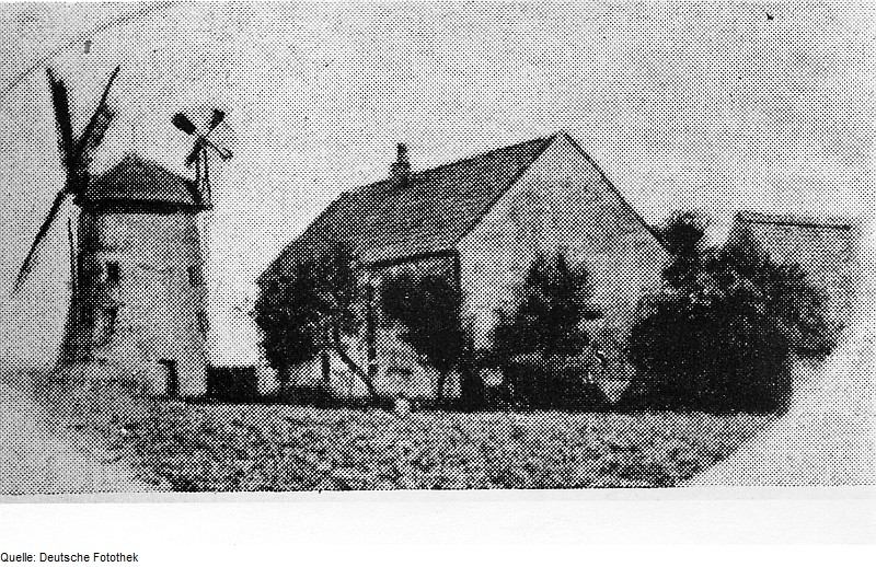 Original image description from the Deutsche Fotothek Tharandt-Pohrsdorf. Windmühle Pohrsdorf, aus: Kulturleben Kreis Freital, Jan. 1960